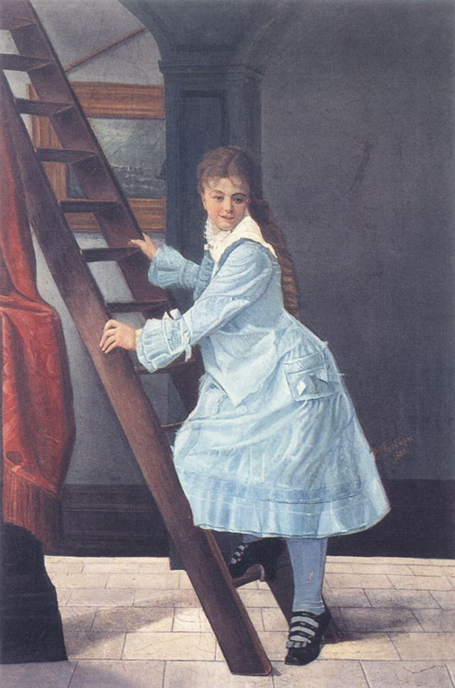 Το κορίτσι με το γαλάζιο φόρεμα του Επαμεινώνδα Κονιδάρη